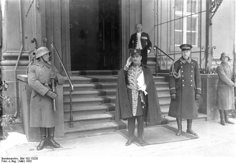 Der neue kaiserlich-persische Gesandte in Berlin. Anajatollaah Khan Samiy überreichte dem Reichspräsidenten von Hindenburg sein Beglaubigungsschreiben ! Der neue kaiserlich-persische Gesandte beim Verlassen des Reichspräsidenten-Palais.